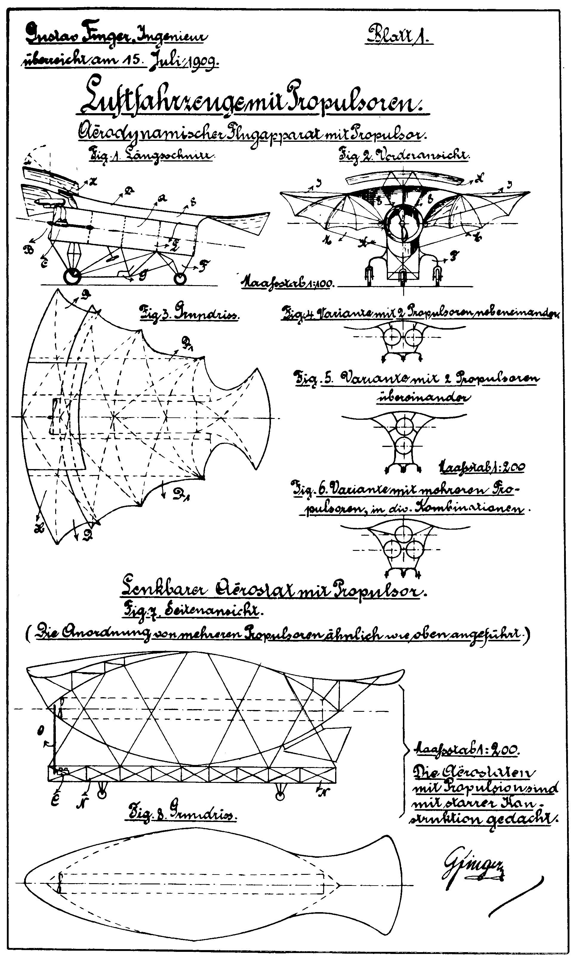 Příloha žádosti o rakousko-uherský patent na reaktivní letadlo s propulsory "Cyklon"